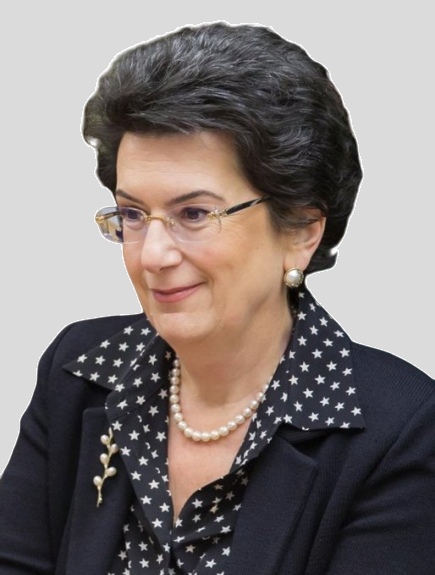 Нино Анзоровна Бурджанадзе (род.1964) — грузинский государственный и политический деятель.